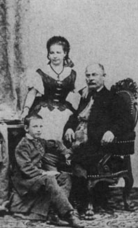 A Latabár-dinasztia alapítója, Latabár Endre feleségével, Török Máriával és Latabár Kálmán Árpáddal